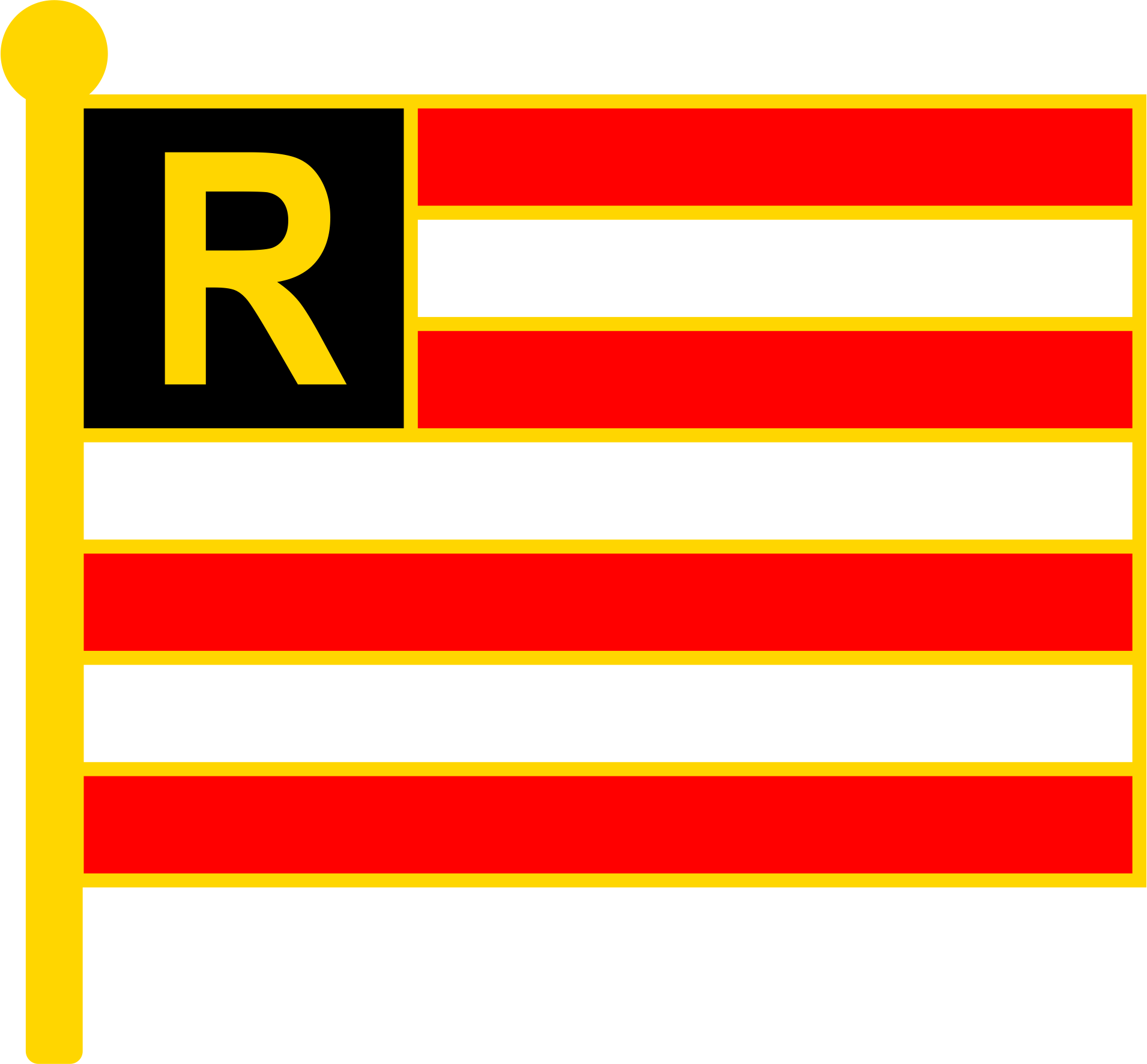 Symbol sportovního klubu Regatta Prag, jenž provozoval kromě bruslení a veslování také fotbal. Předloha: historický před-zápasový plakát.